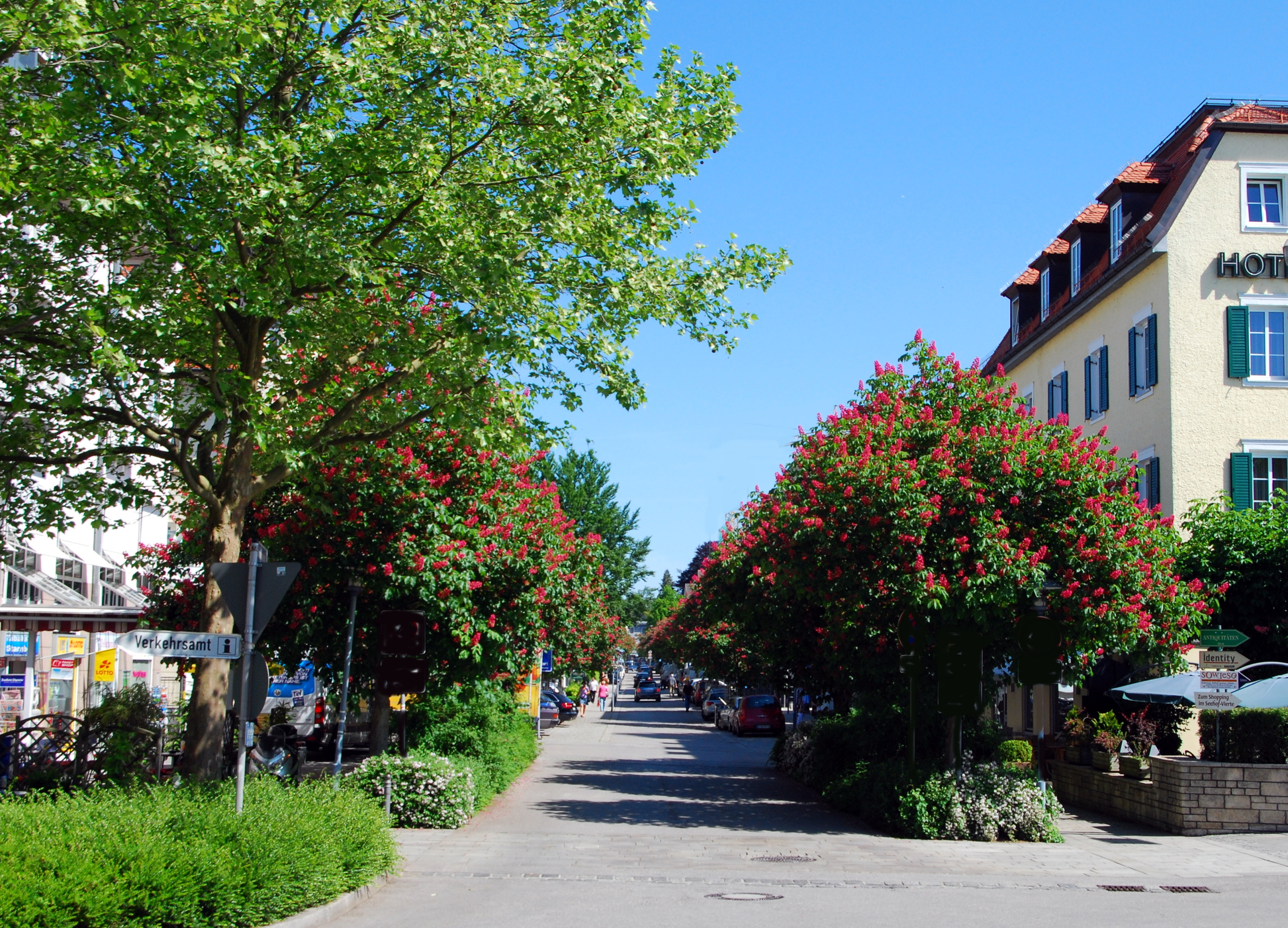 Starnberg, Maximilianstraße. Durch den Umbau von ehemaligen Villen und den Neubau von Geschäftshäusern hat sich ab den 1990er Jahren das Haupteinkaufszentrum der Stadt in die Maximilianstraße verlagert.